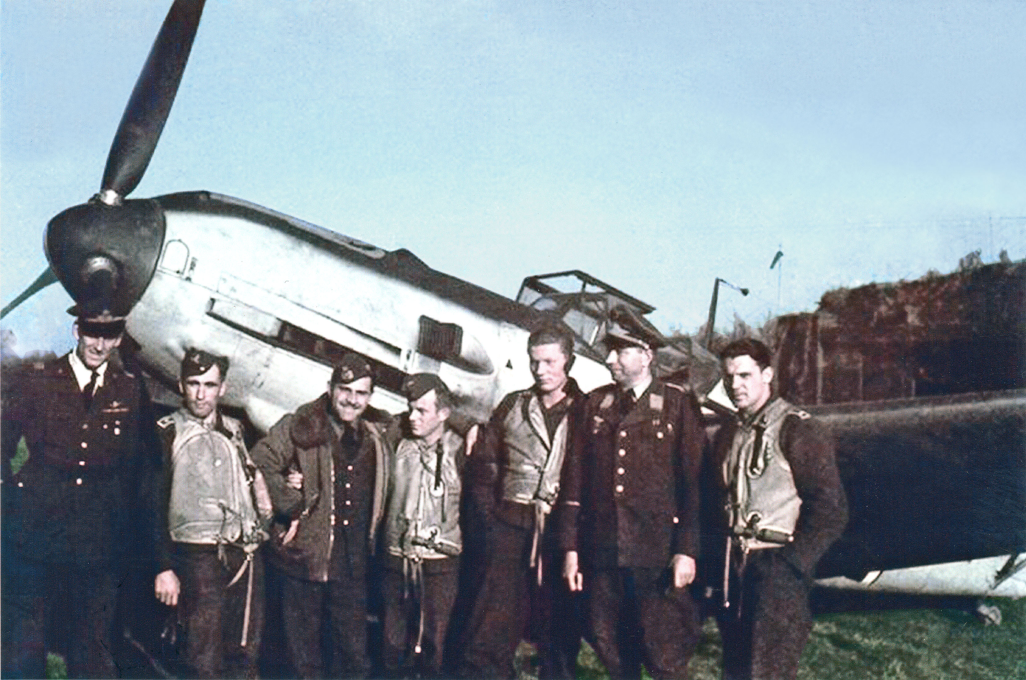 Duitse en Italiaanse jachtvliegers voor een BF 109 op vliegveld Souburg. De Luftwaffe benutte het Zeeuwse vliegveld vooral voor konvooibegeleidingsvluchten en de bewaking van het luchtruim boven de strategisch belangrijke Scheldemonding.